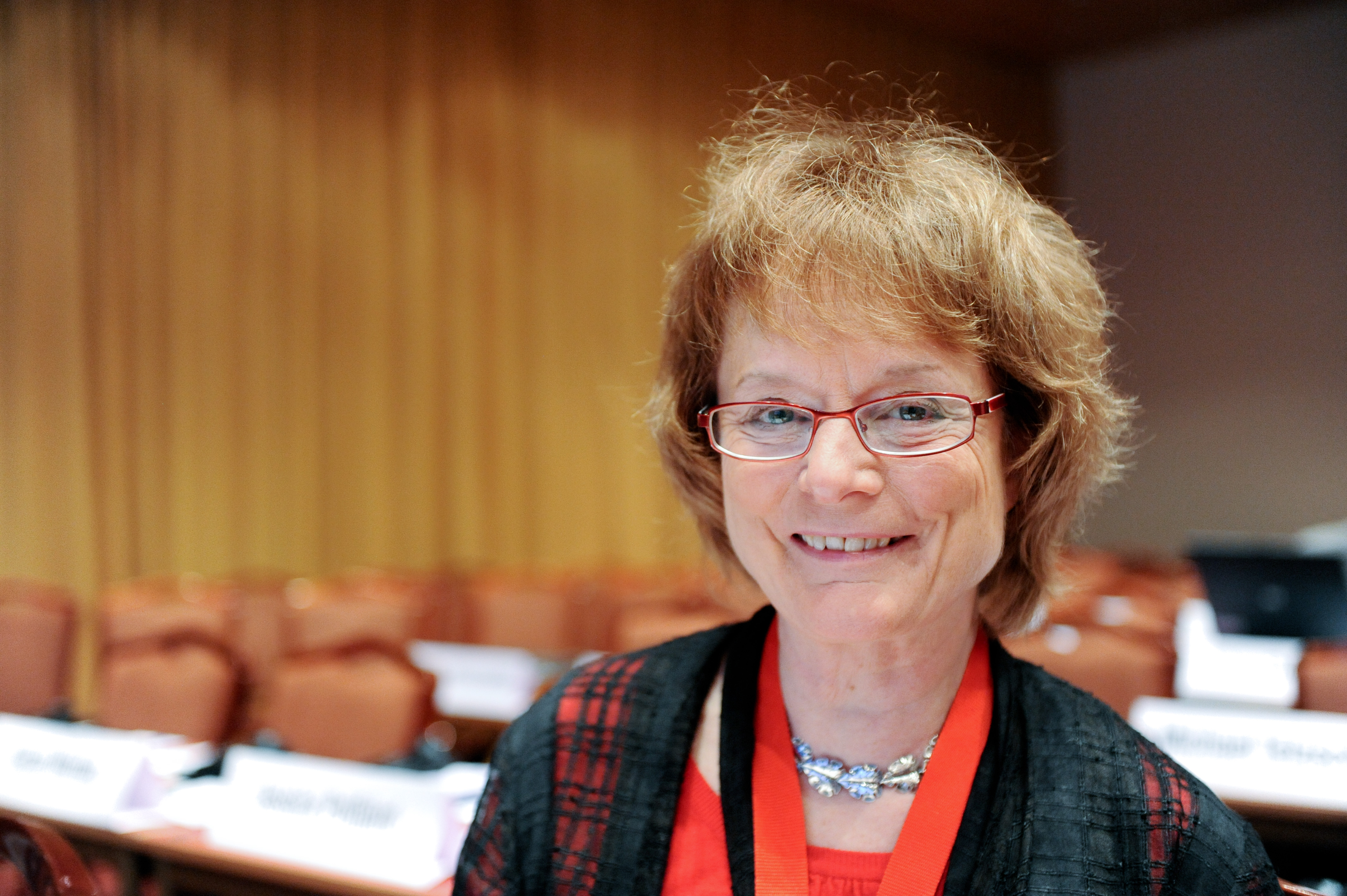 Bente Dahl Radikale Venstre (RV) Danmark. Nordiska rådets session i Reykjavik 2010.